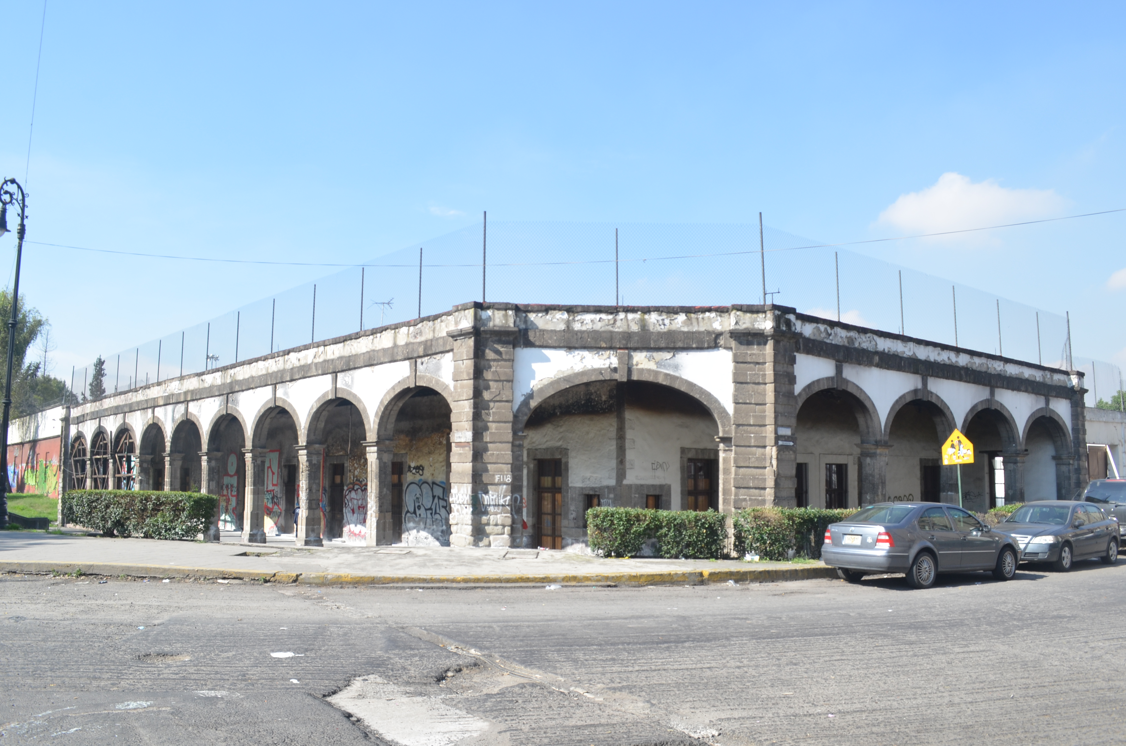 Antigua Garita de San Lázaro